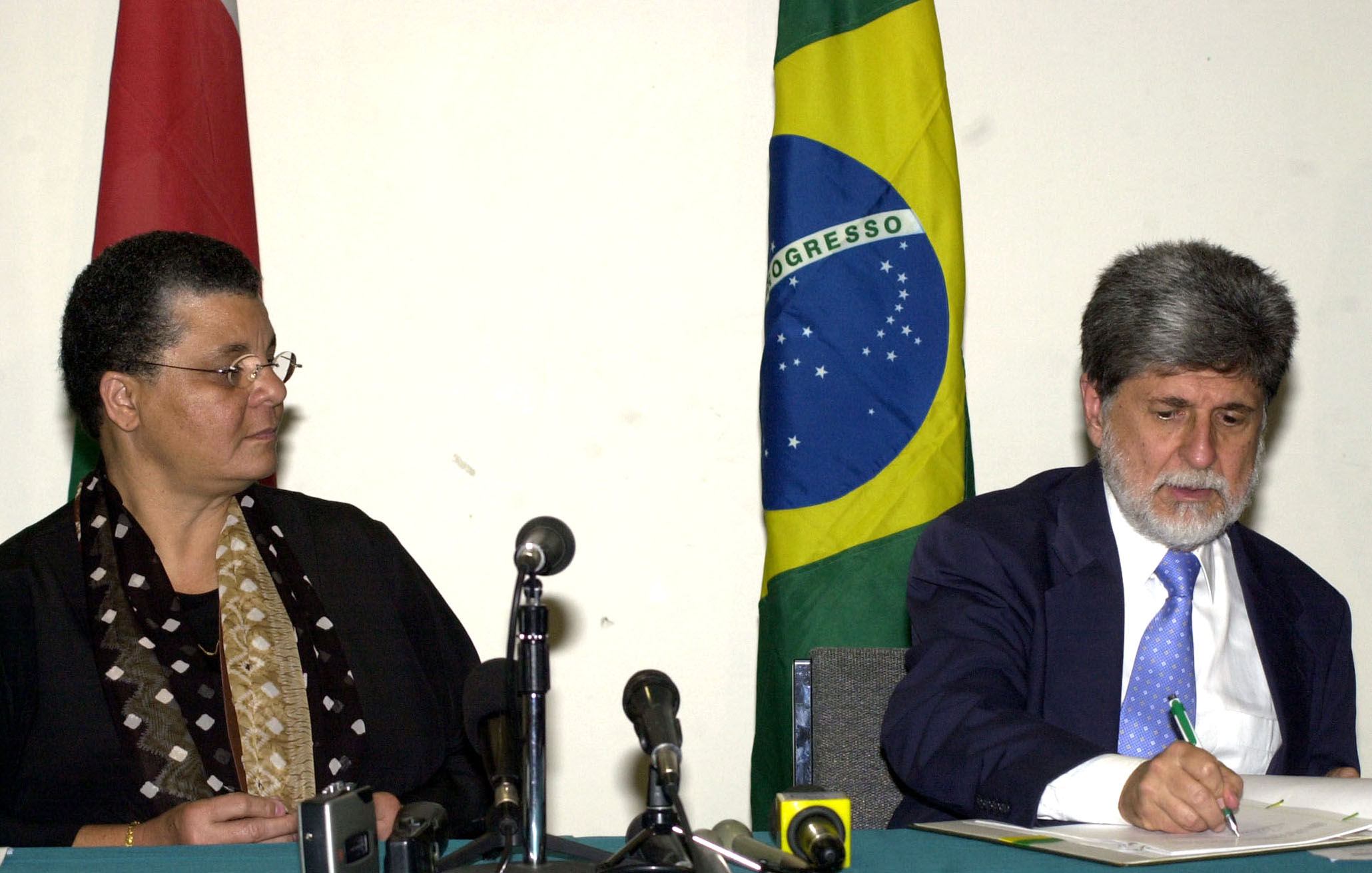 Paramaribo/Suriname - O ministro das Relações Exteriores, Celso Amorim, ao lado da ministra dos Assuntos Estrangeiros, Maria Levens, assina acordo sobre regularização migratória entre os dois países, no Hotel Krasnapolsky.